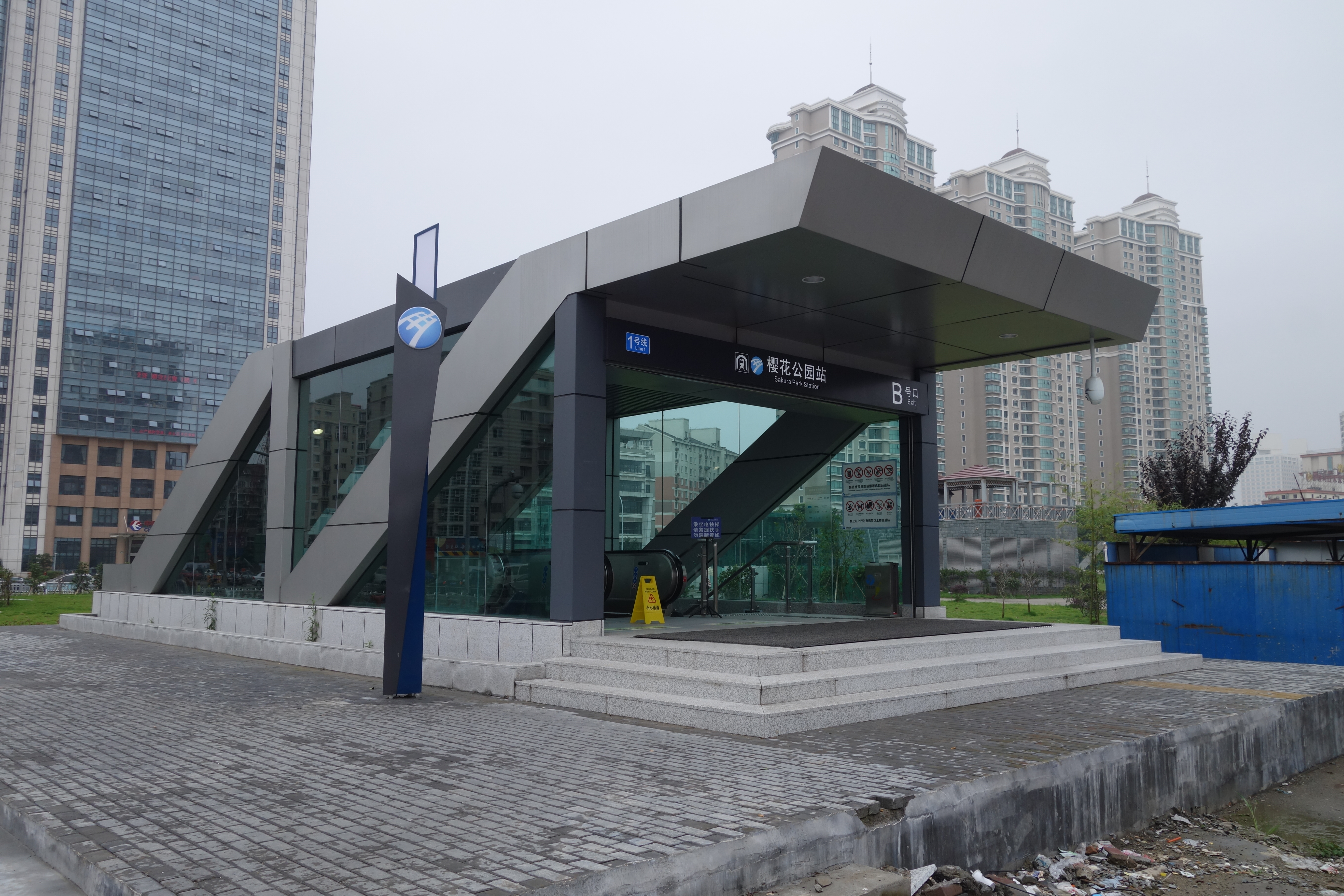 樱花公园站B口